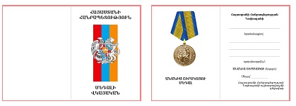 Անանիա Շիրակացու մեդալի վկայական